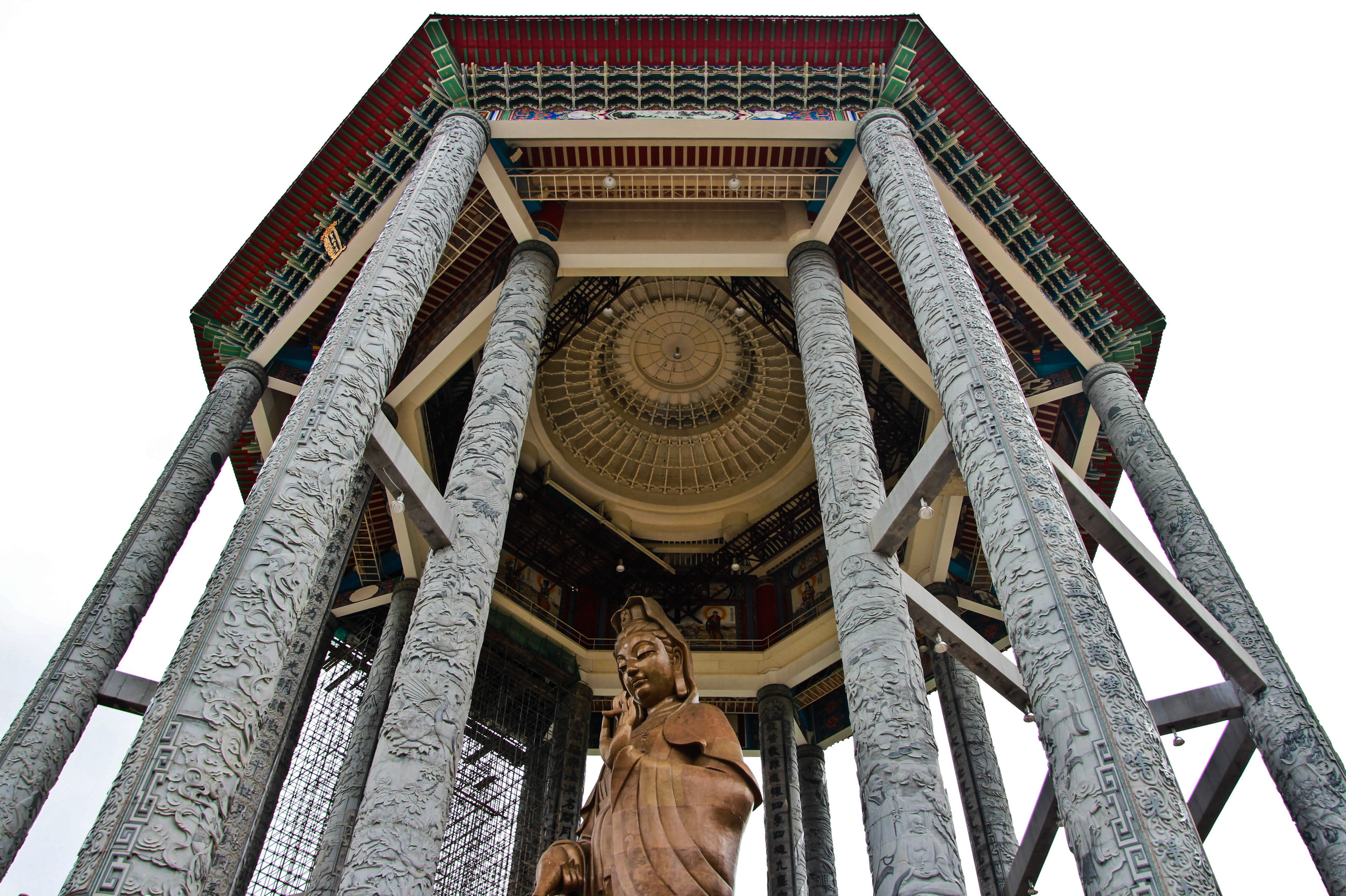 Kek Lok Si Tempel, Georgetown, Penang